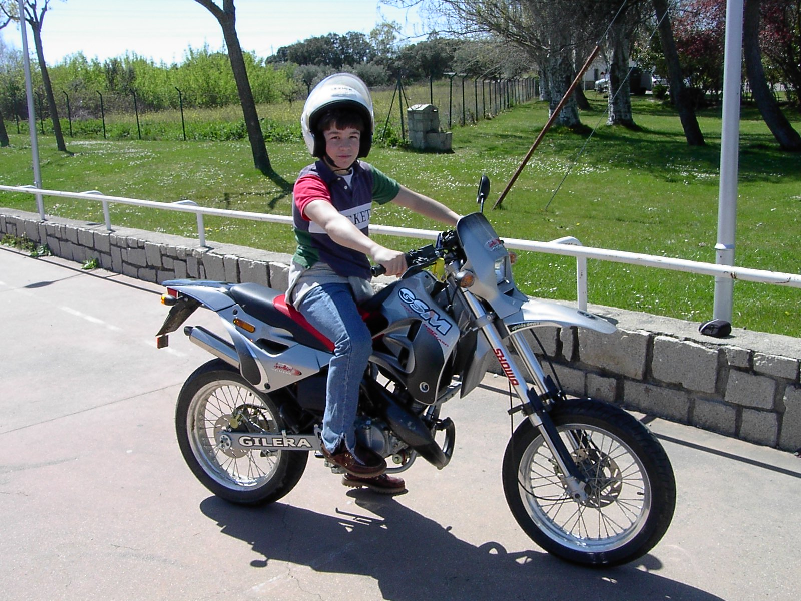 Gilera GSM 50